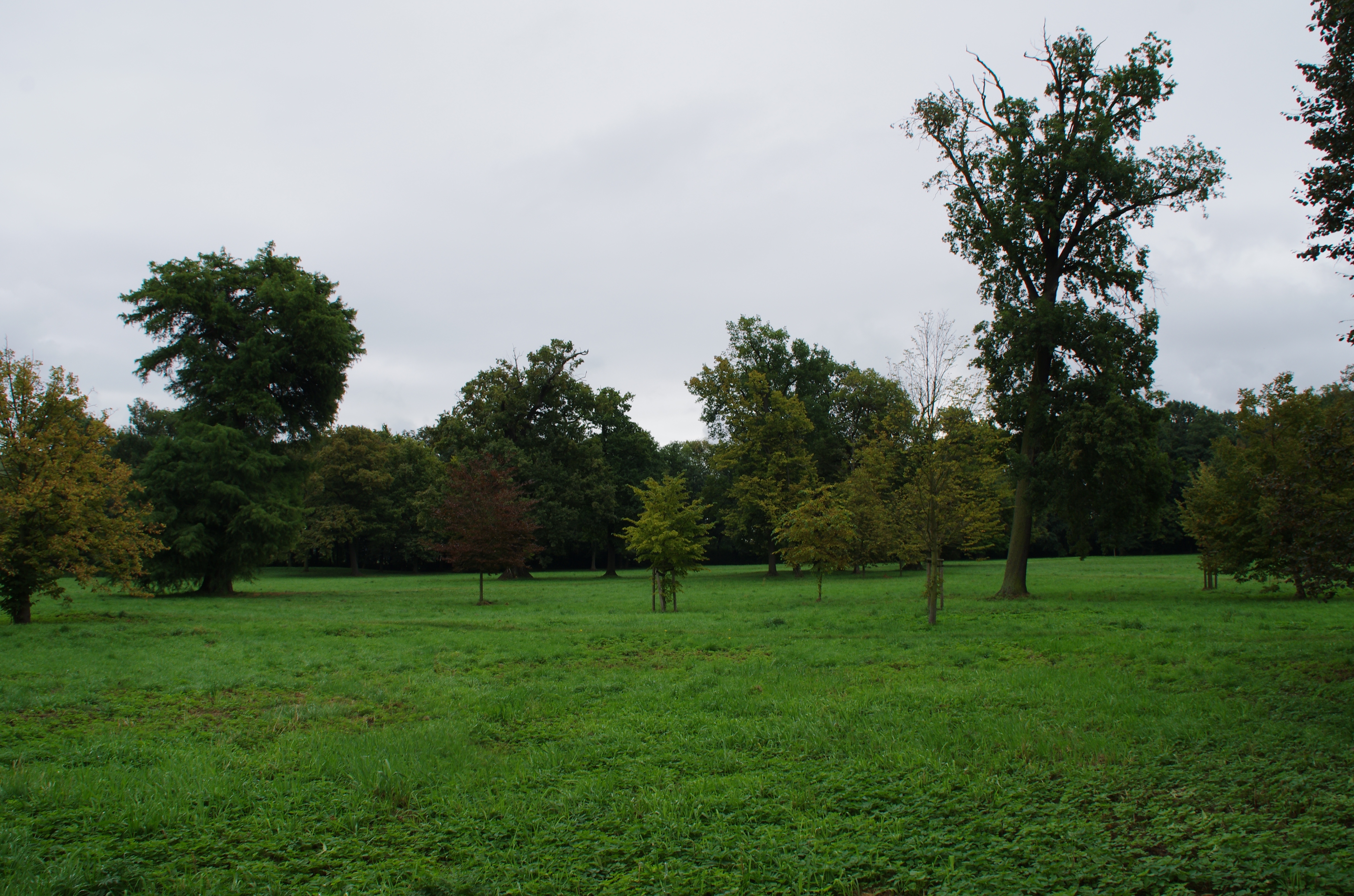 Baruth/Mark in Brandeburg. Das Schloss ist der Sitz der Familie Solms-Baruth gewesen und stetht unter Denkmalschutz.